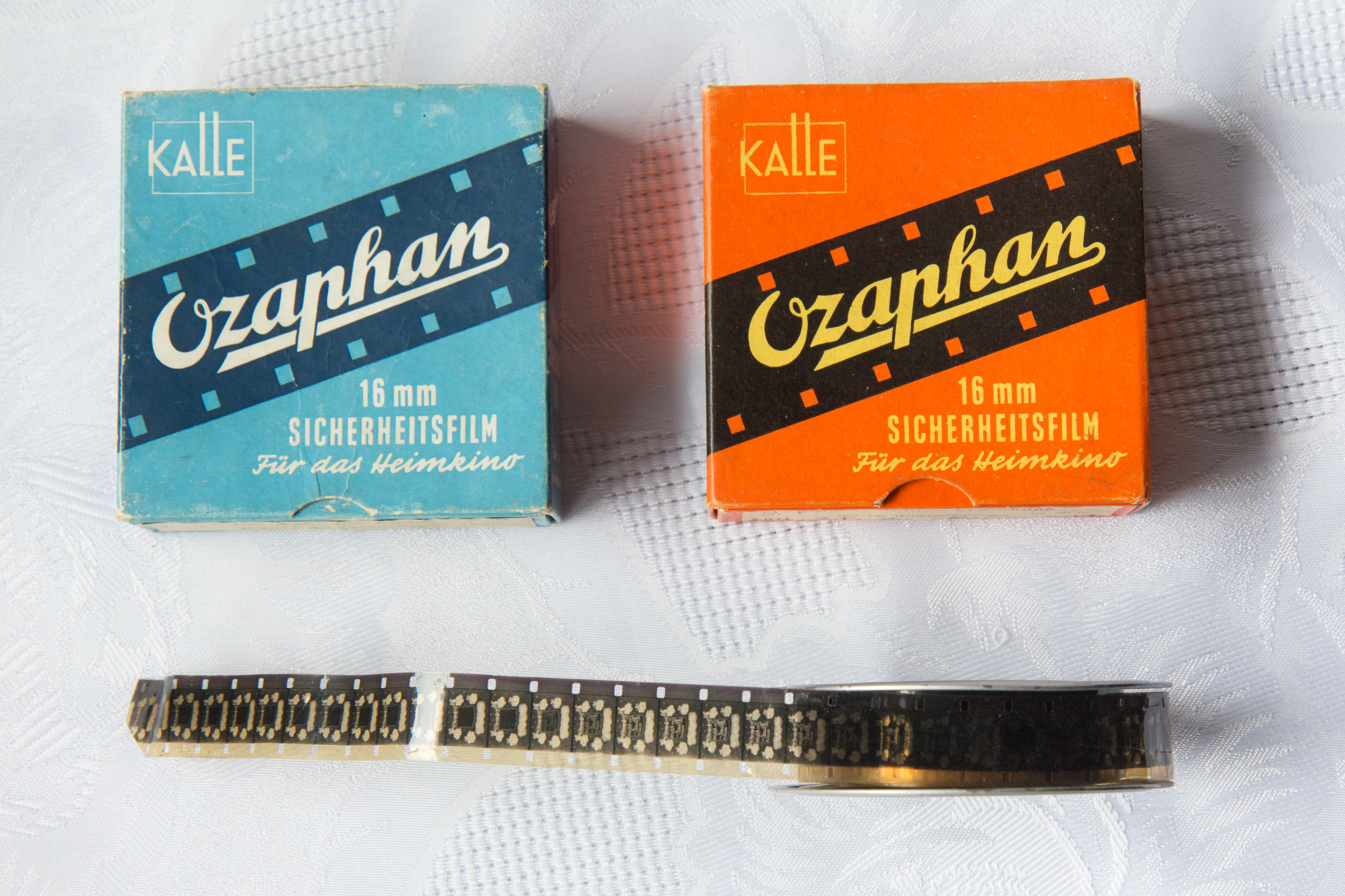 Sicherheitsfilm "Schnewittchens Erweckung" und "Die Rache der Köchin" (aus urheberrechtlichen Gründen nur die Rückseite der Schachtel), Spule einzeln mit Filmstreifen